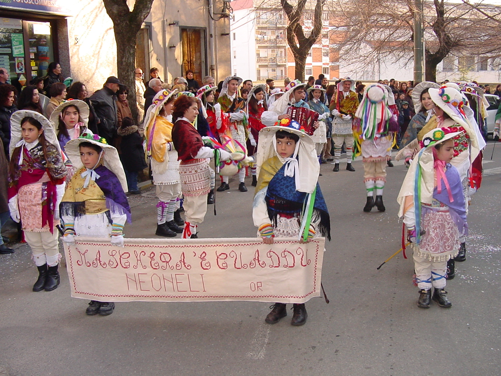 Costumi carnevaleschi di Neoneli. Foto del 22 feb. 2003 (scattata a Nuoro durante il Carnevale)